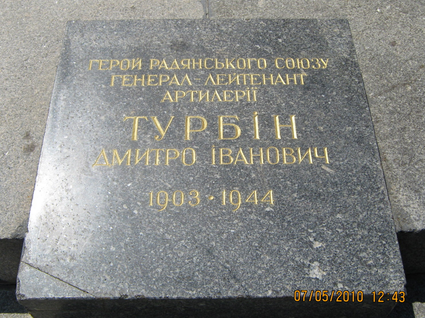 Меморіал Вічної Слави.